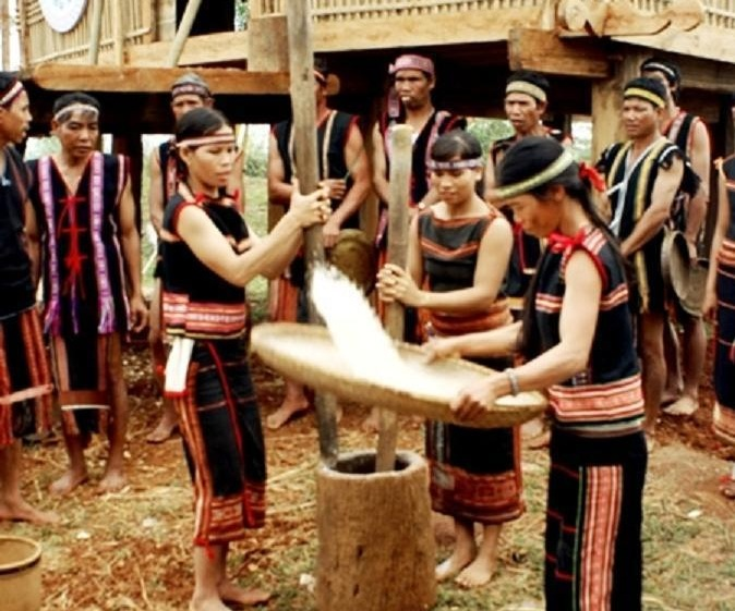 Trang phục truyền thống của người Xê Đăng